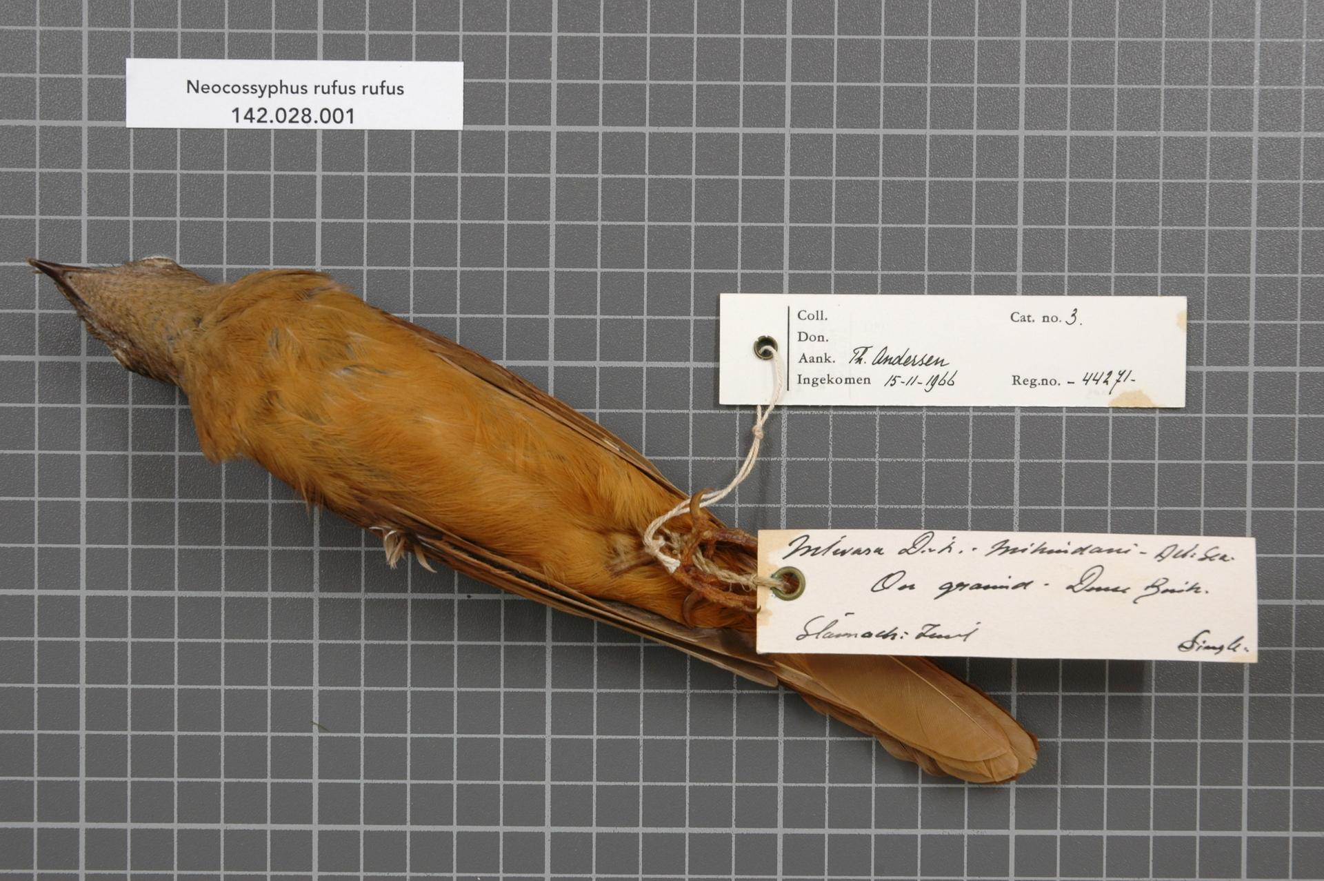 Neocossyphus rufus rufus (Fischer & Reichenow, 1884)